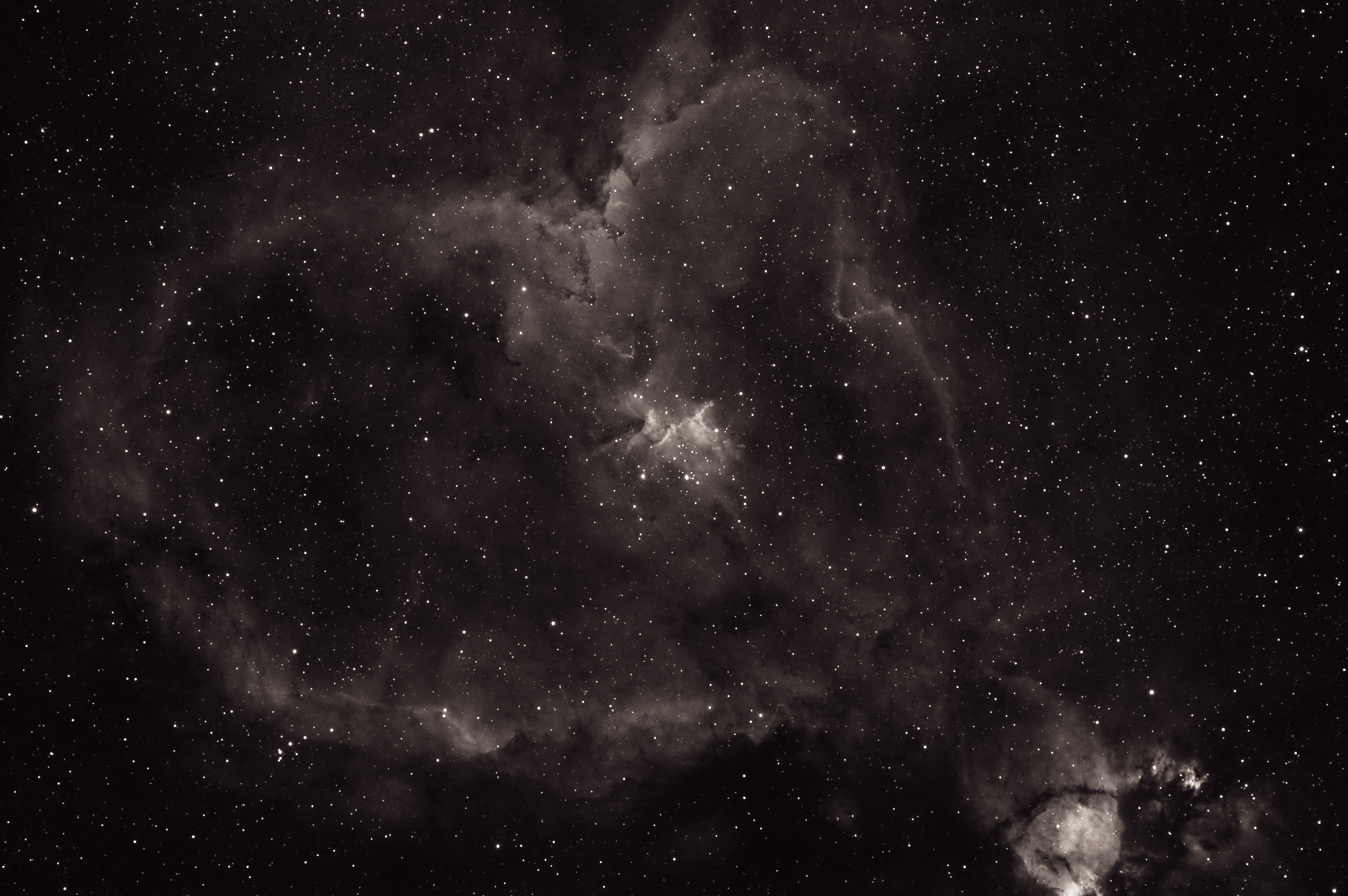 version Ha en 5,7 hrs d'intégration avec un appareil photo numérique Canon EOS 1000d